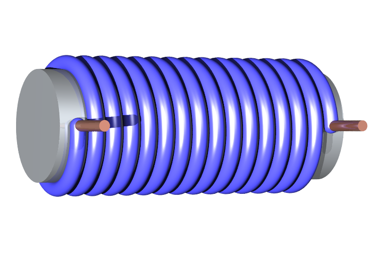 Elektromagnet